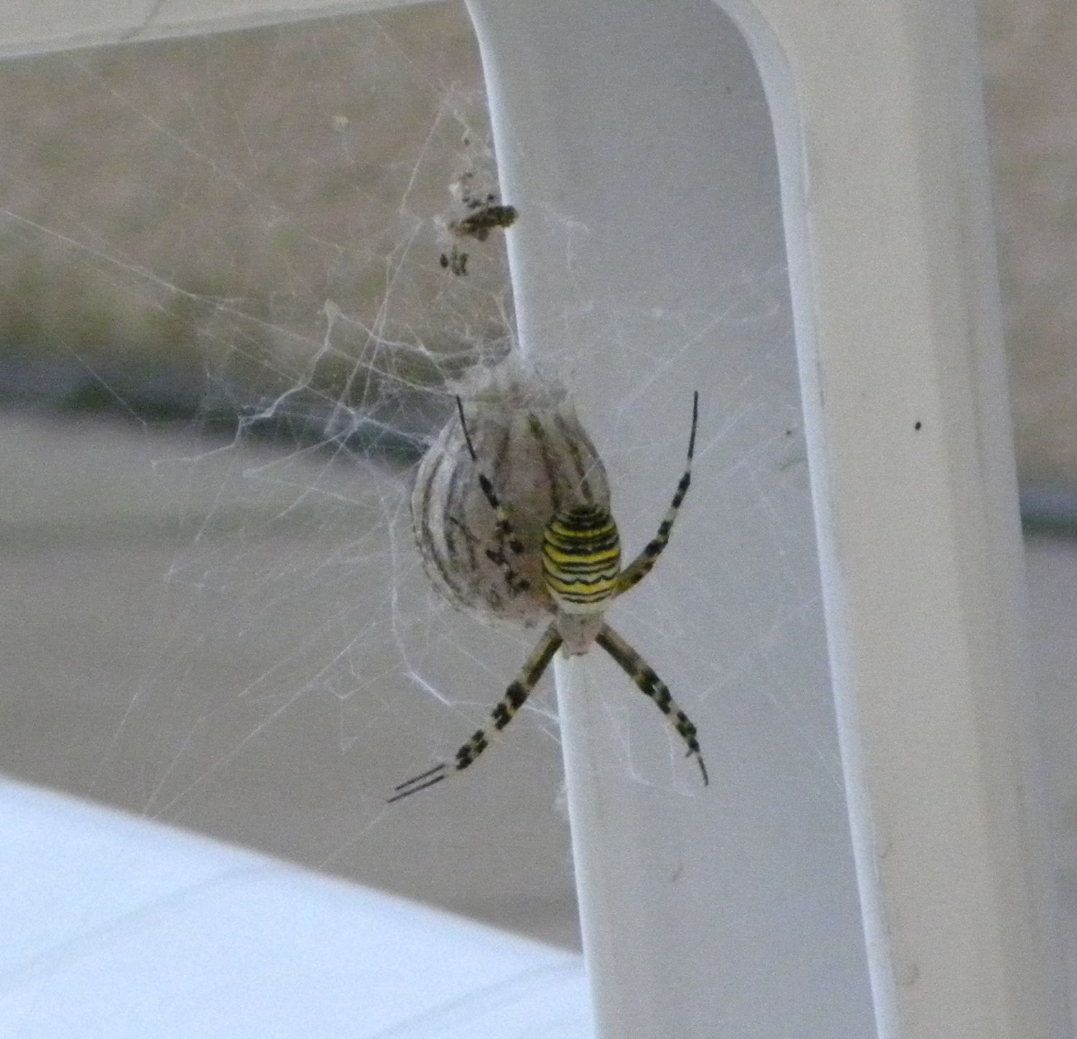 Araignée Argiope avec derrière son cocon